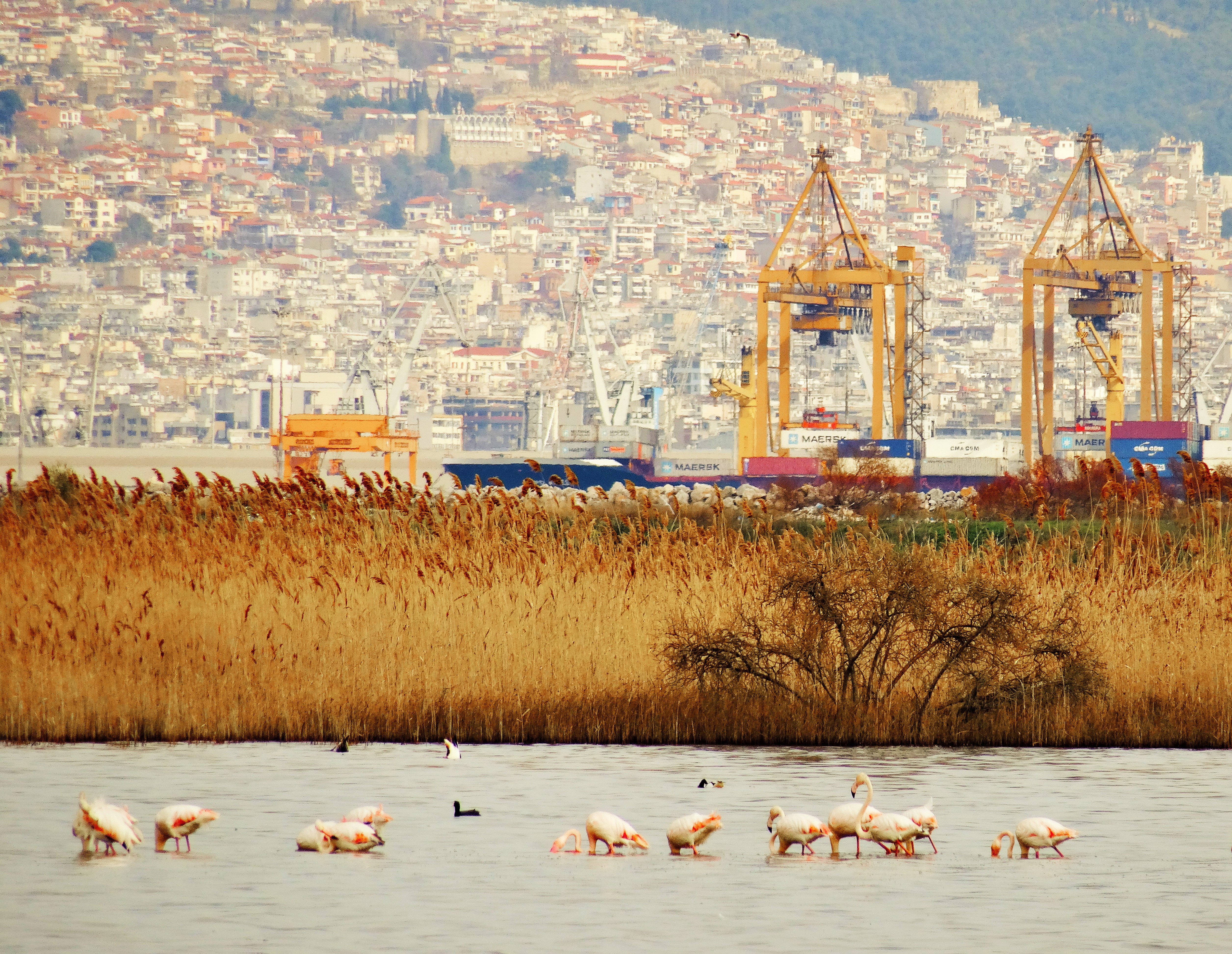 Φυσικό Τοπίο vs. Αστικό /Φλαμίνγκο vs. Θεσσαλονίκη/ Δελτα Αξιού/ Εθνικό Πάρκο This is a photography of Natura 2000 protected area with ID GR1220002